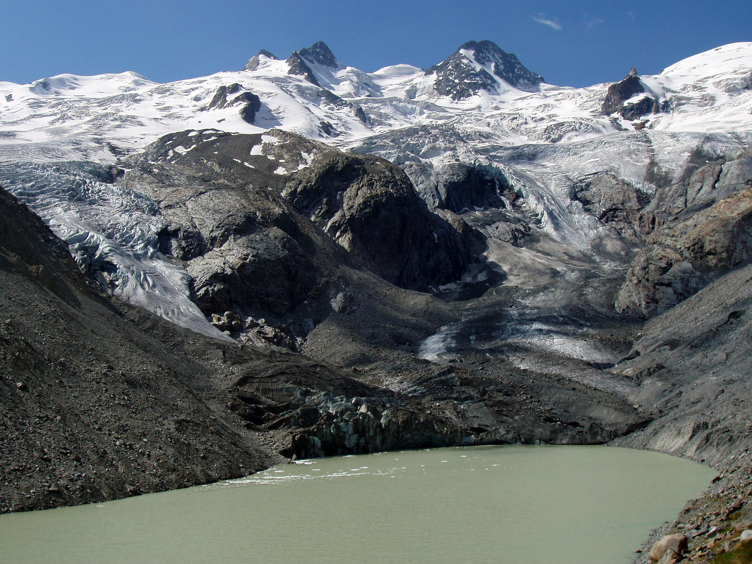 Der italienisch-schweizerische Sellakamm mit dem Sella- (links) und dem Roseggletscher (rechts). Die Gipfel von links nach rechts sind: Dschimels / I Gemelli, 3.501 und 3.477 m, La Sella, 3.584 m, Piz Glüschaint, 3.594 m Nebengipfel der La Muongia, 3.412 m.